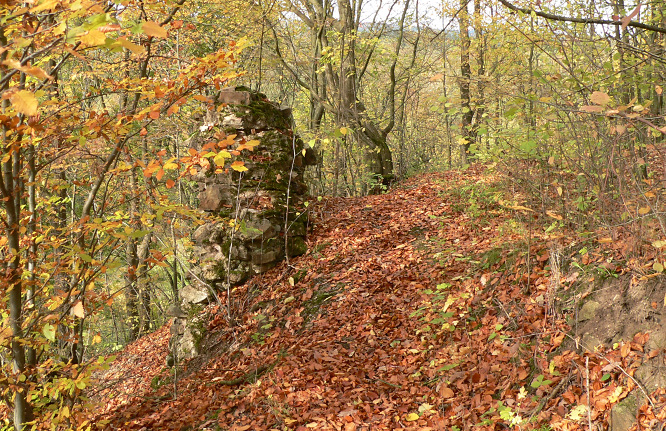 Burgruine Densberg